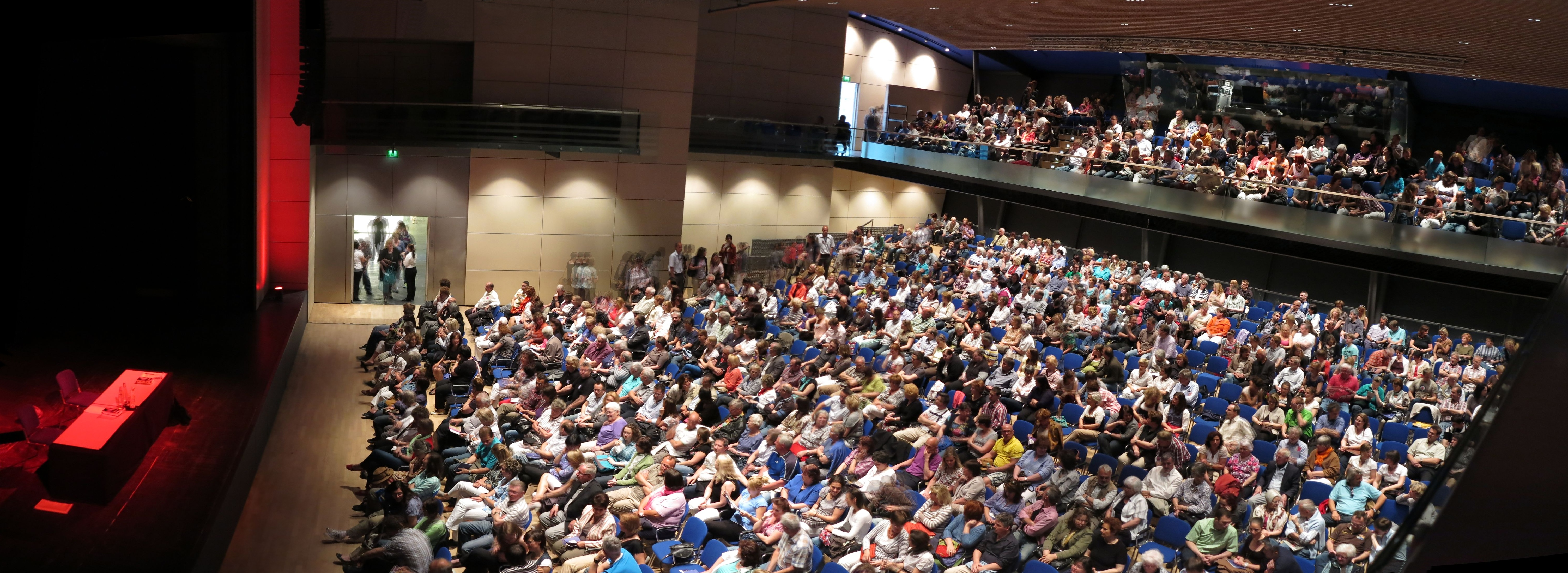 Fürstenfeldbruck, Veranstaltungsforum Fürstenfeld, Stadtsaal, anläßlich der Lesung "Schutzpatron" von Volker Klüpfel und Michael Kobr am 20. April 2012